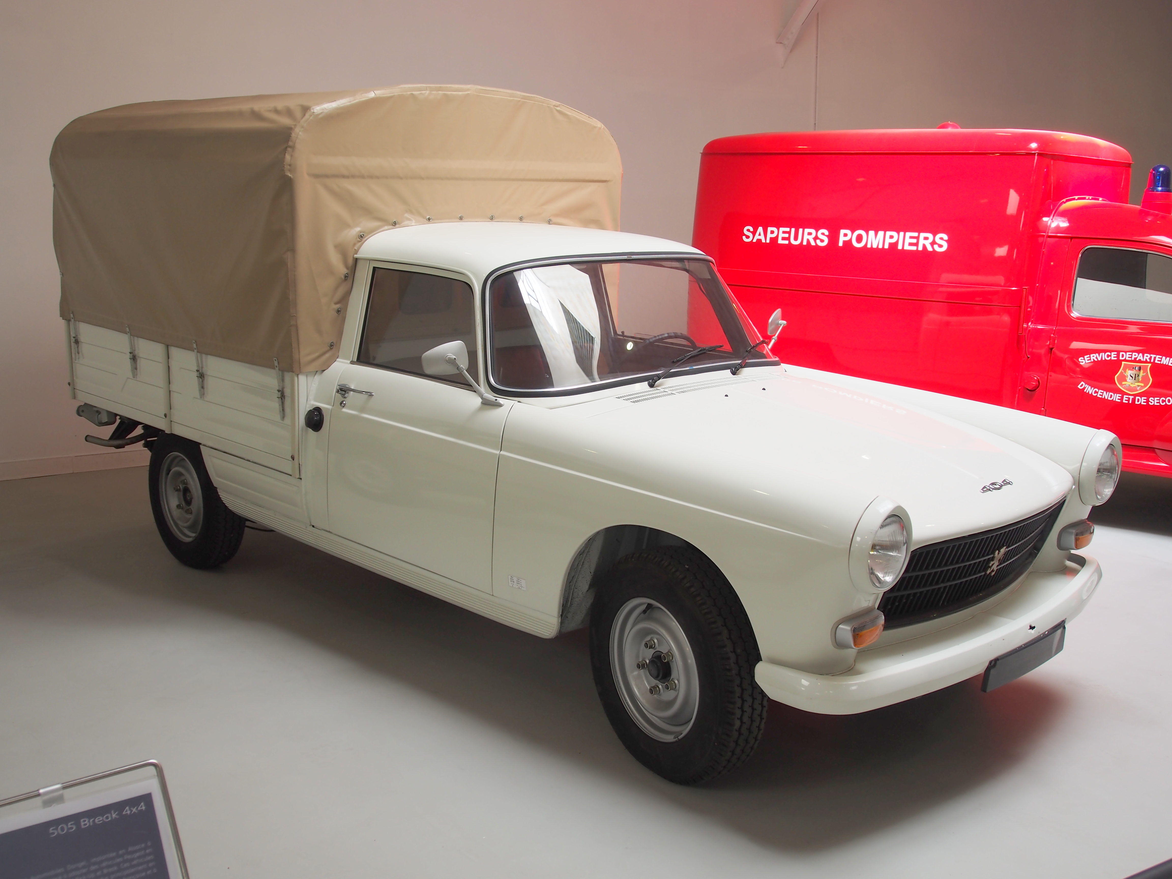 Photographed at the Musée de l'Aventure Peugeot-Sochaux, France.